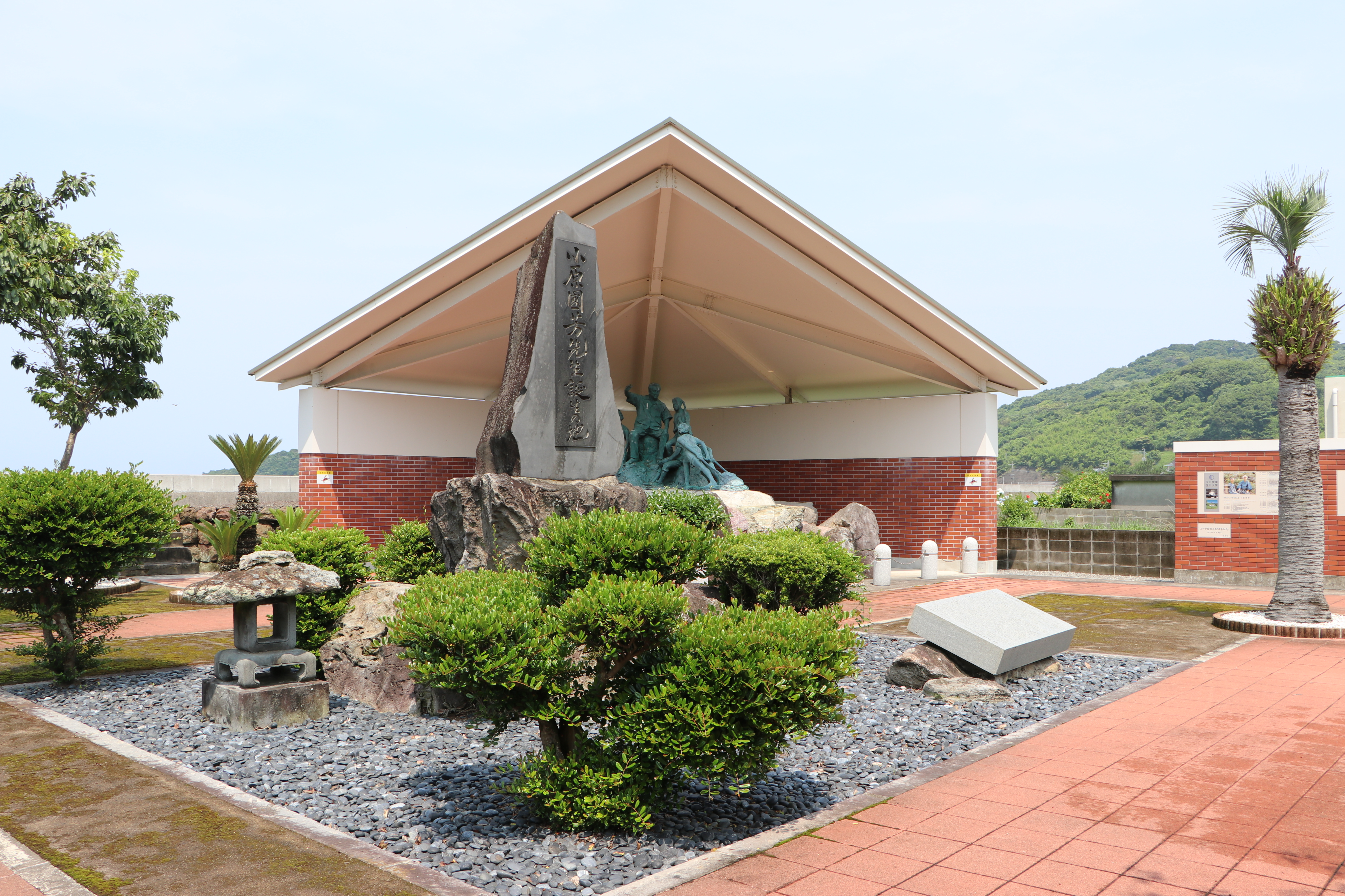 坊津町久志にある玉川学園創設者の小原國芳誕生地。 Canon EOS 80D